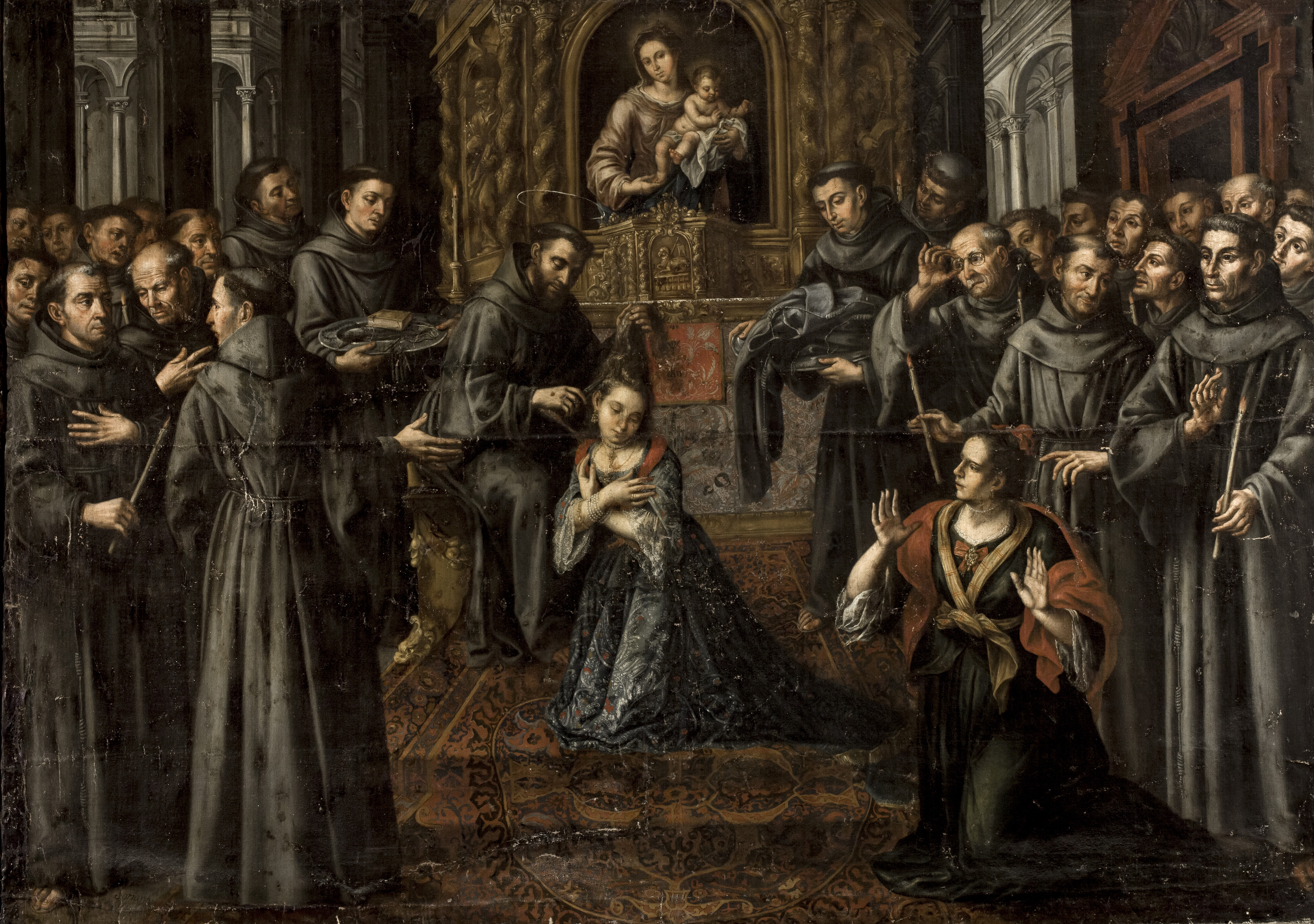 La obra representa a Santa Clara de Asís profesando sus votos en presencia de San Francisco de Asís, lo que tuvo lugar en la capilla de la Porciúncula de Asís en la festividad del Domingo de Ramos de 1212. Y conviene señalar que esta obra formó parte de un conjunto de lienzos que Juan Ruiz Soriano ejecutó para el desaparecido convento de San Francisco de Sevilla, que fue demolido en 1841.